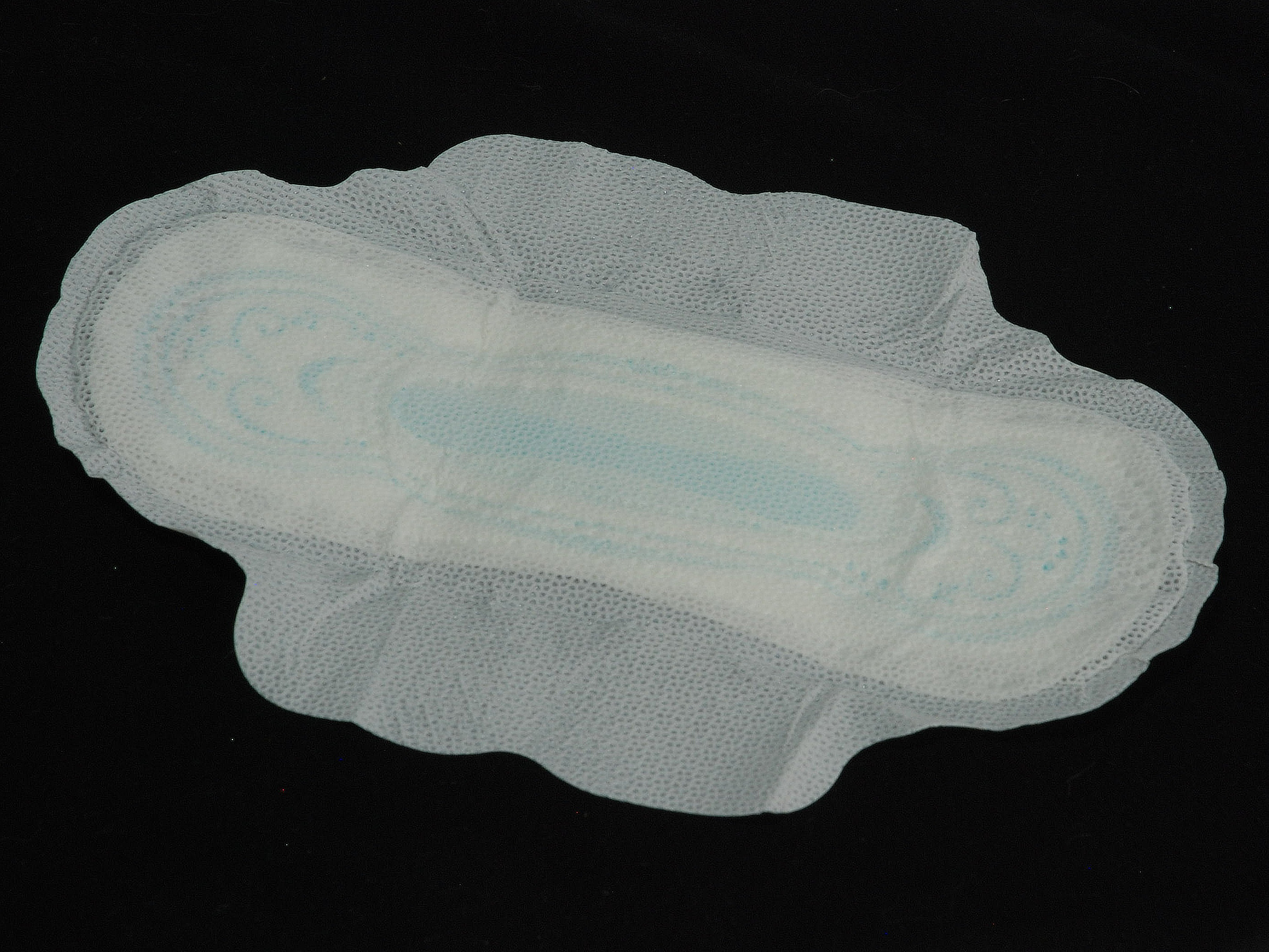 Hygienické vložky Hygienická vložka s křidélky